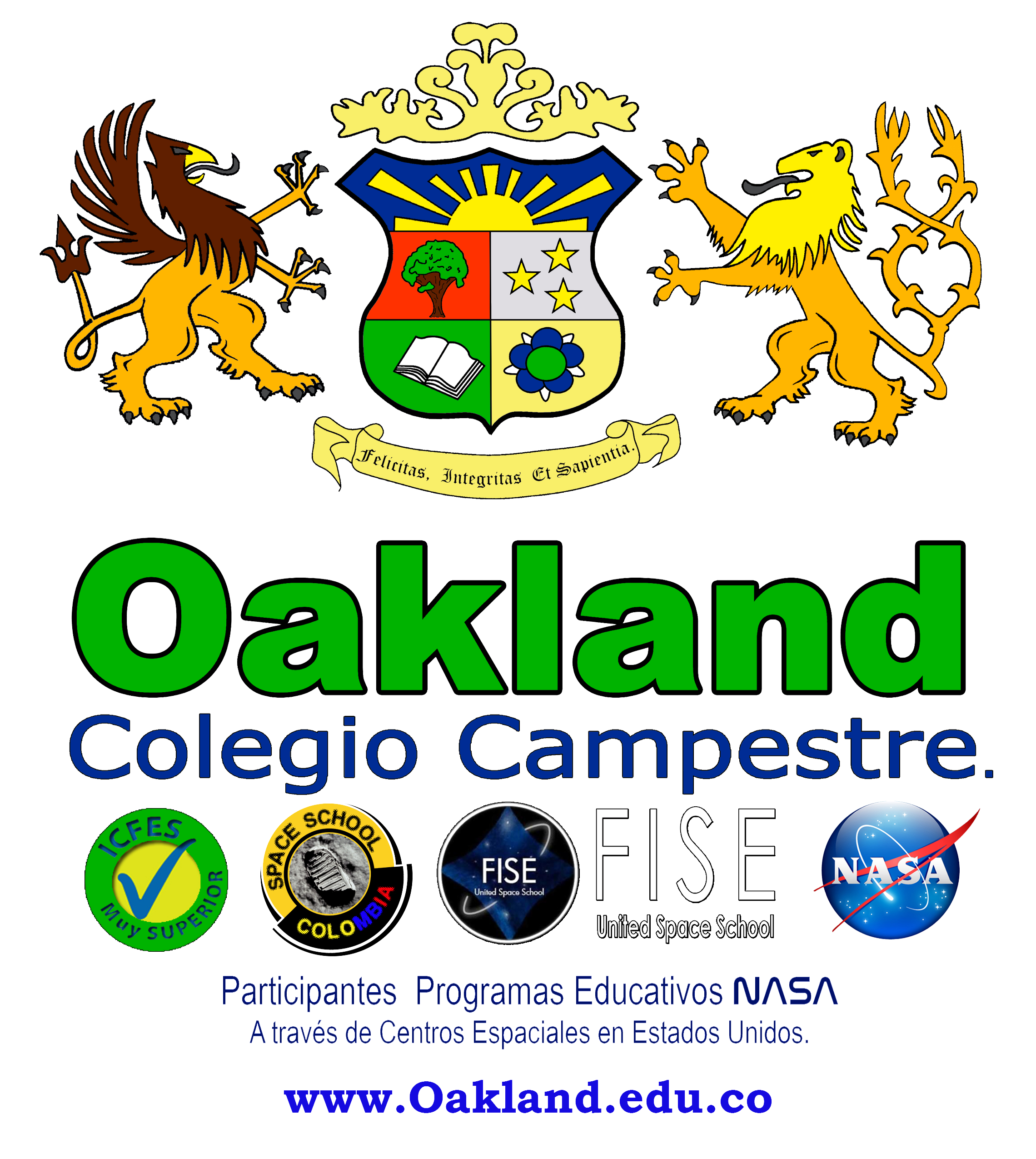 Escudo de Armas. Los símbolos Heráldicos que están representados en nuestro Escudo de Armas lo caracterizan así: Escudo acuartelado dividido en cinco partes desiguales estando coronado en jefe por un Sol saliente de oro sobre cielo de azur, en representación de Nobleza, sabiduría e iluminación sobre la justicia, lealtad, caridad y Hermosura. Las tres estrellas de oro sobre plata, que simboliza paz y sinceridad, reciben la luz del gran sol y comunican los rasgos de justicia a su pueblo. Roble de Sinople sobre Gules, simbolizando fortaleza, victoria y osadía. Libro abierto de plata sobre sinople simbolizando cultura sobre la esperanza, fe, amistad, servicio y respeto. La flor de loto sobre oro simboliza los elementos éticos fundamentales. La imagen de la flor de loto representa la pureza y perfección gracias a sus cuatro virtudes –fragancia, limpieza, ternura y suavidad son comparadas con las cuatro virtudes del reino del Dharma –permanencia, regocijo, sí mismo y pureza. La fragancia de las flores de loto hace que las personas se sientan alegres y felices. La flor de loto es también comparada con el corazón de una persona. Se dice que todos los seres vivientes tienen una flor de loto creciendo en su interior. La flor de loto, que a pesar de crecer en las aguas más estancadas y pantanosas al abrirse siempre es perfecta e inmaculada, simboliza la total purificación de los oscurecimientos del cuerpo, habla y mente, Junto al mensaje de belleza, amor y deleite, el loto transmite también el mensaje de poder. El poder de Dios instalado en el hombre Los símbolos externos, son dos tenantes así: Grifo contonante en símbolo de ingenio y grandeza. León rampante simbolizando el espíritu generosamente guerrero, adornado de las cualidades de vigilancia, dominio, soberanía, majestad y bravura. En el Blasón reza el lema: “Felicitas, Integritas Et Sapientia”; Felicidad, Integridad y Sabiduría.